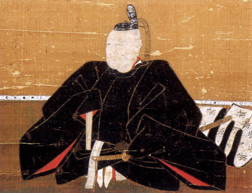 土井利勝 Doi Toshikatu.